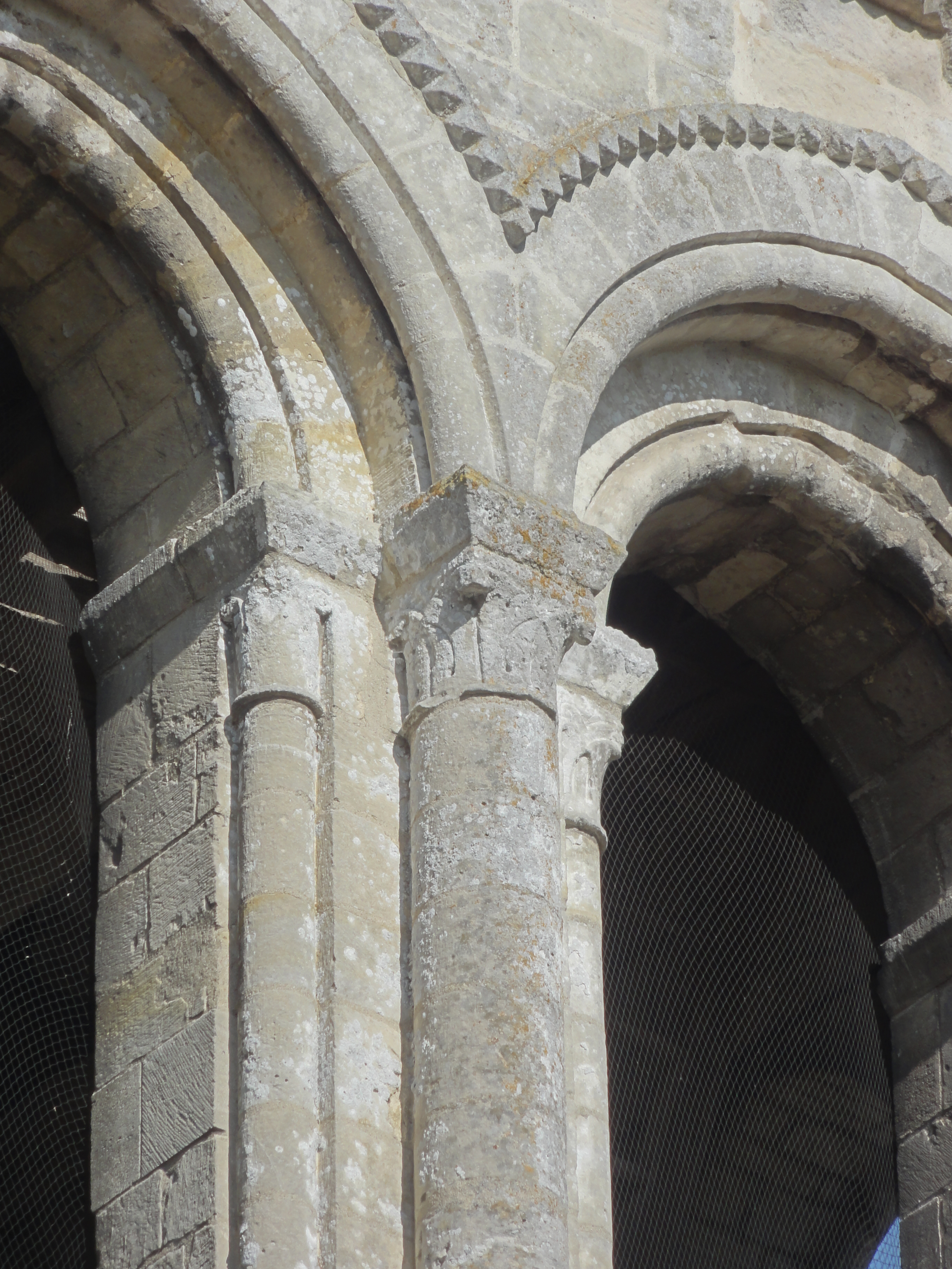 Clocher, colonnettes au milieu des deux baies orientales.